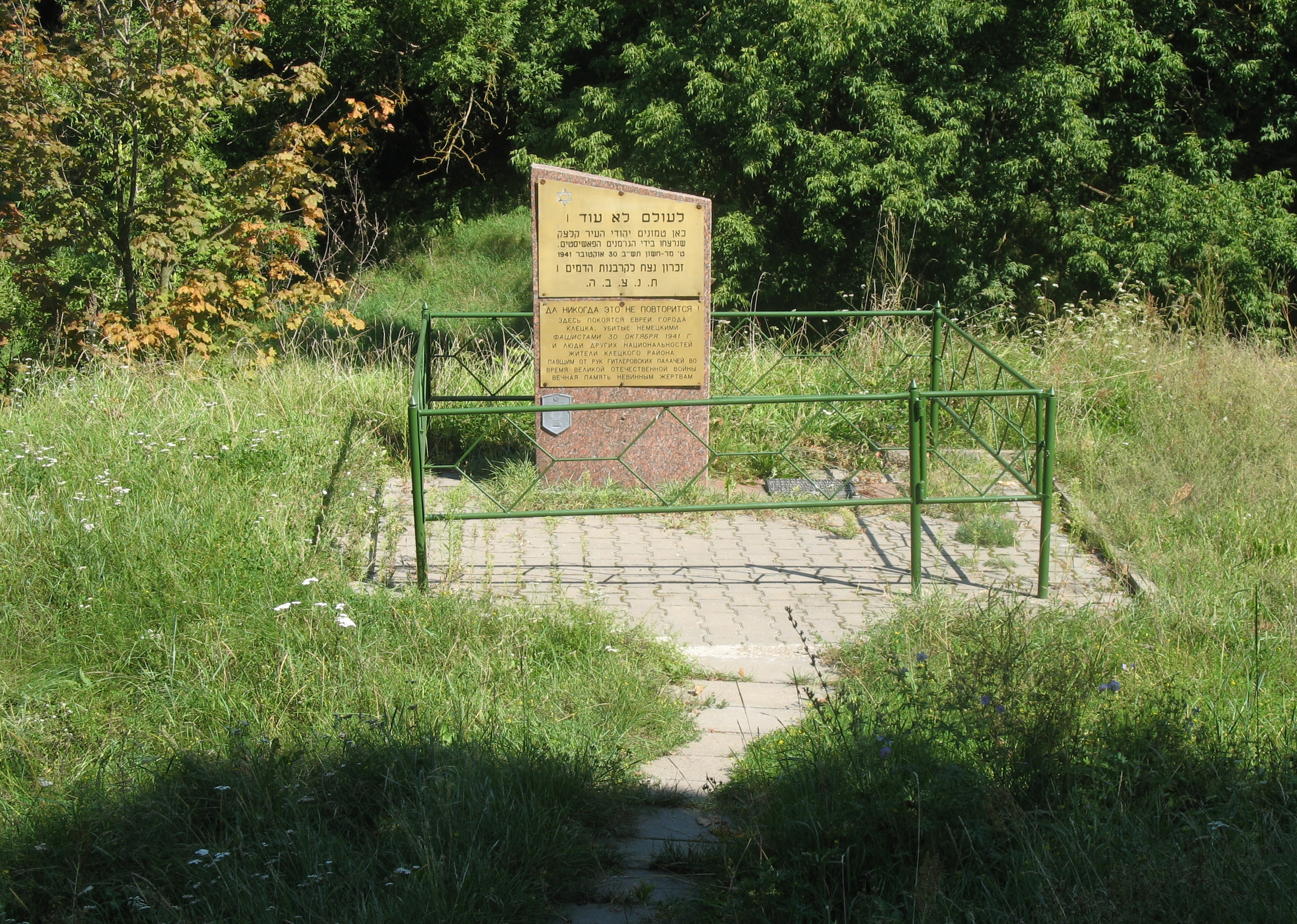 Памятник евреям Клецка, убитым нацистами 30 сентября 1941 года. Находится на территории клецкого кладбища.